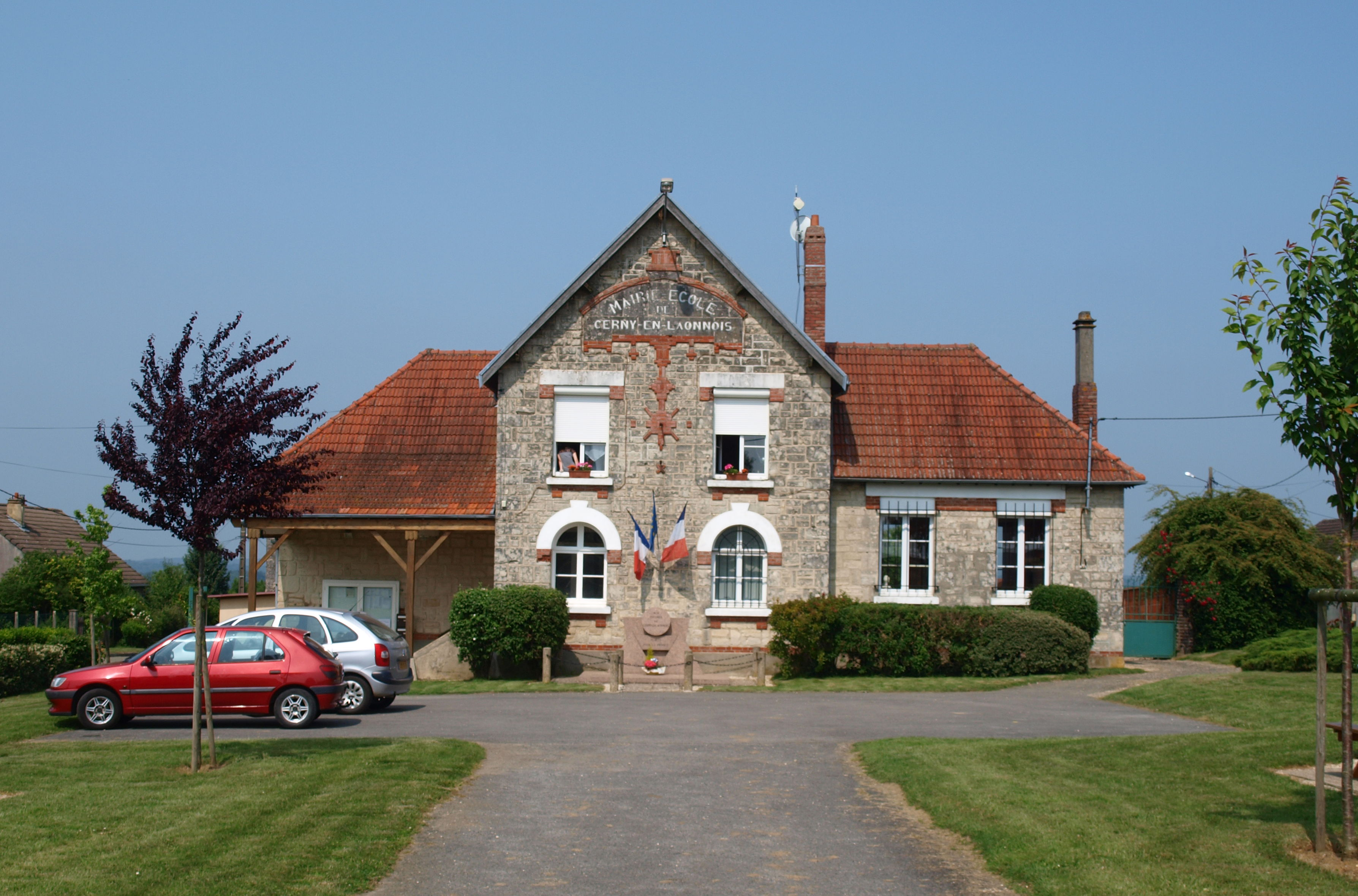 Cerny-en-Laonnois (Aisne, France) ; mairie.